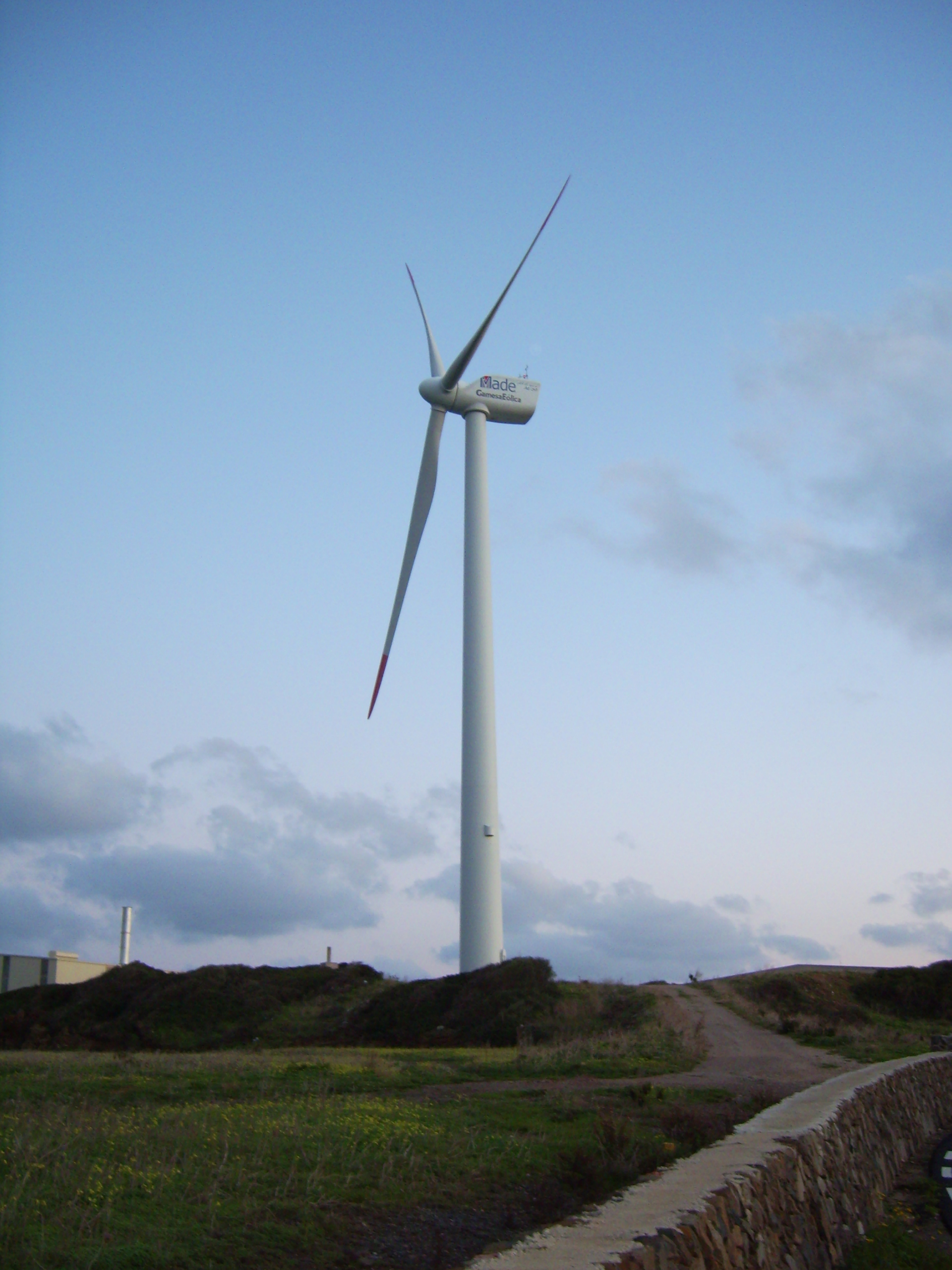 Es Milà Wind farm, Menorca.